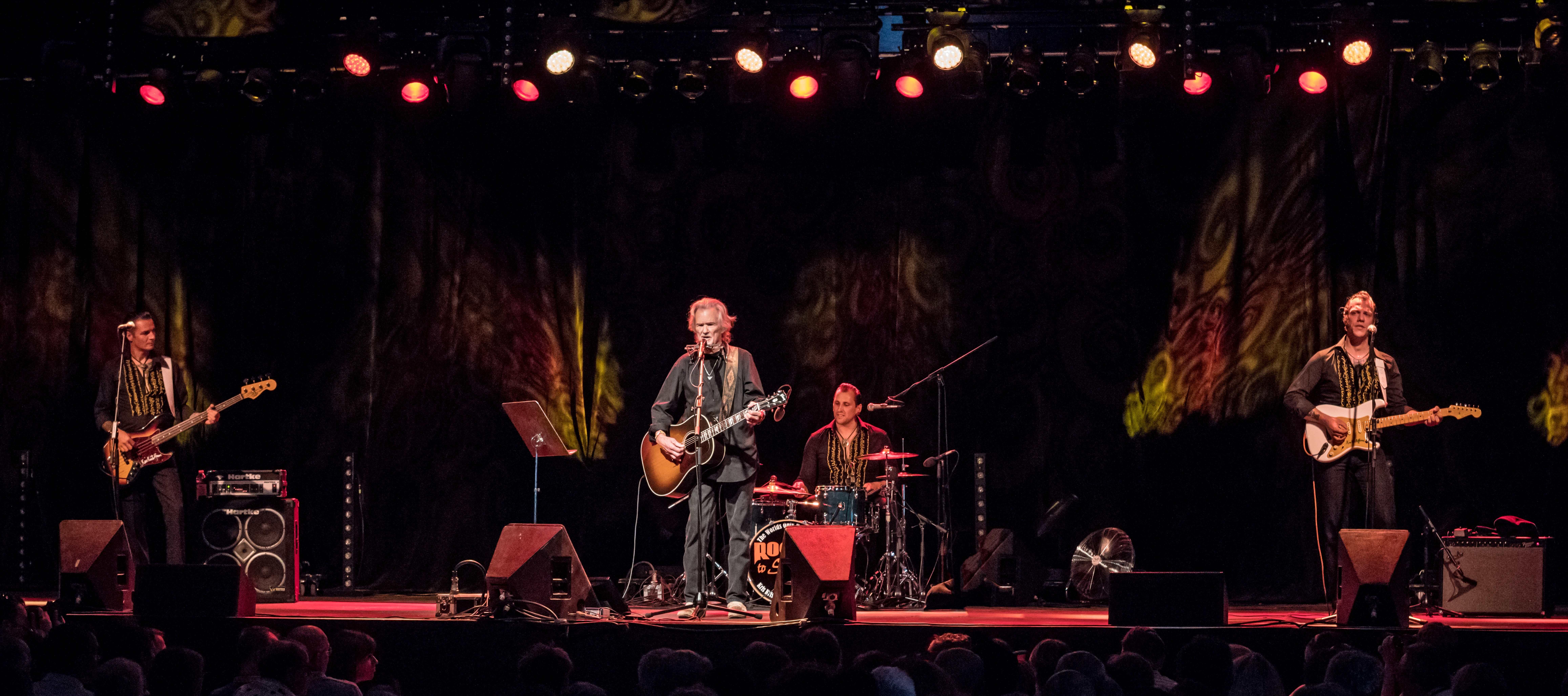 Bilder vom Zelt Musik Festival 2017 in Freiburg im Breisgau Kris Kristofferson